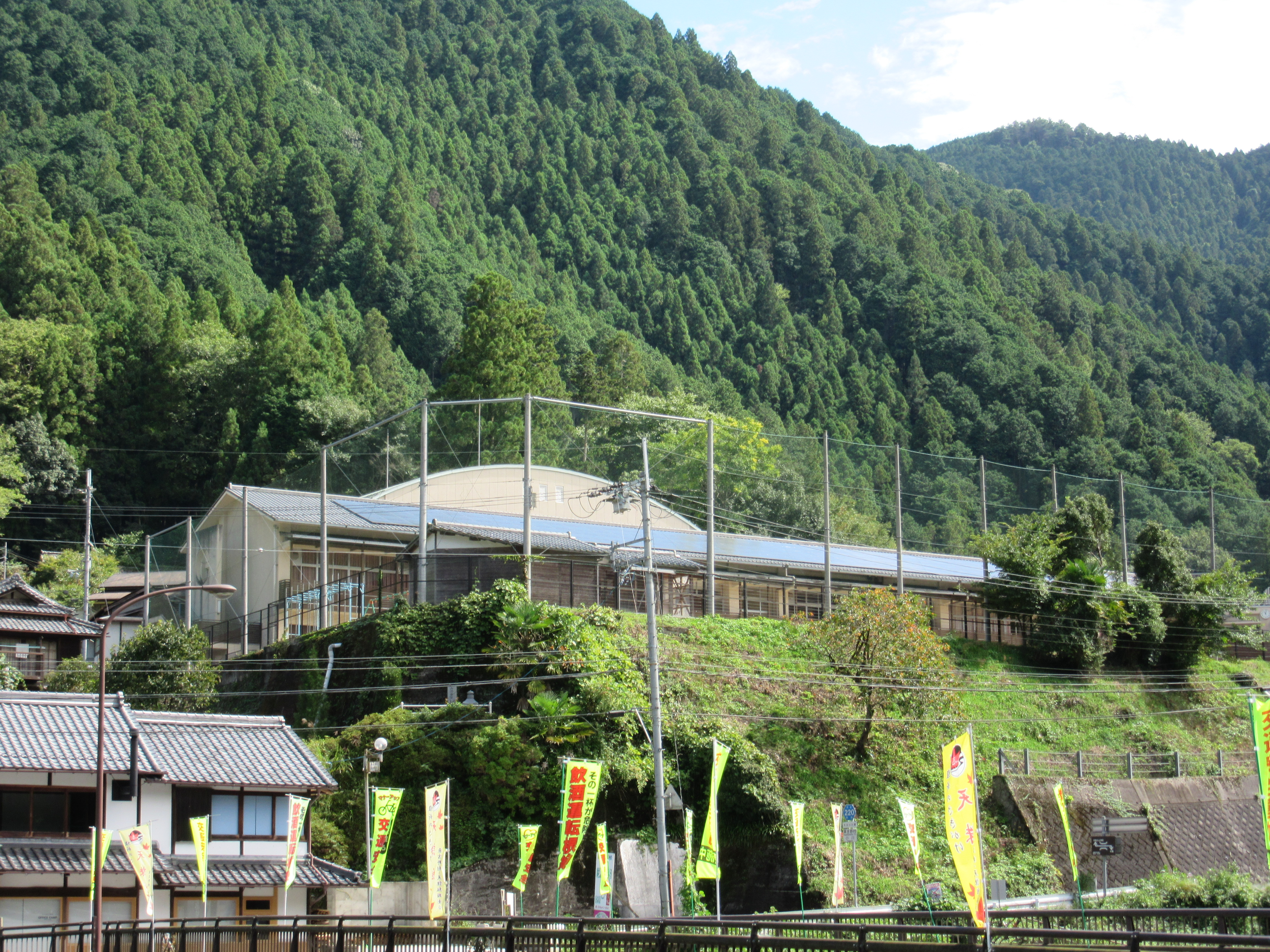 奈良県東吉野村立東吉野小学校